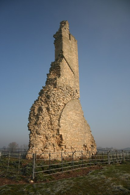 Kirkstead Abbey ruin